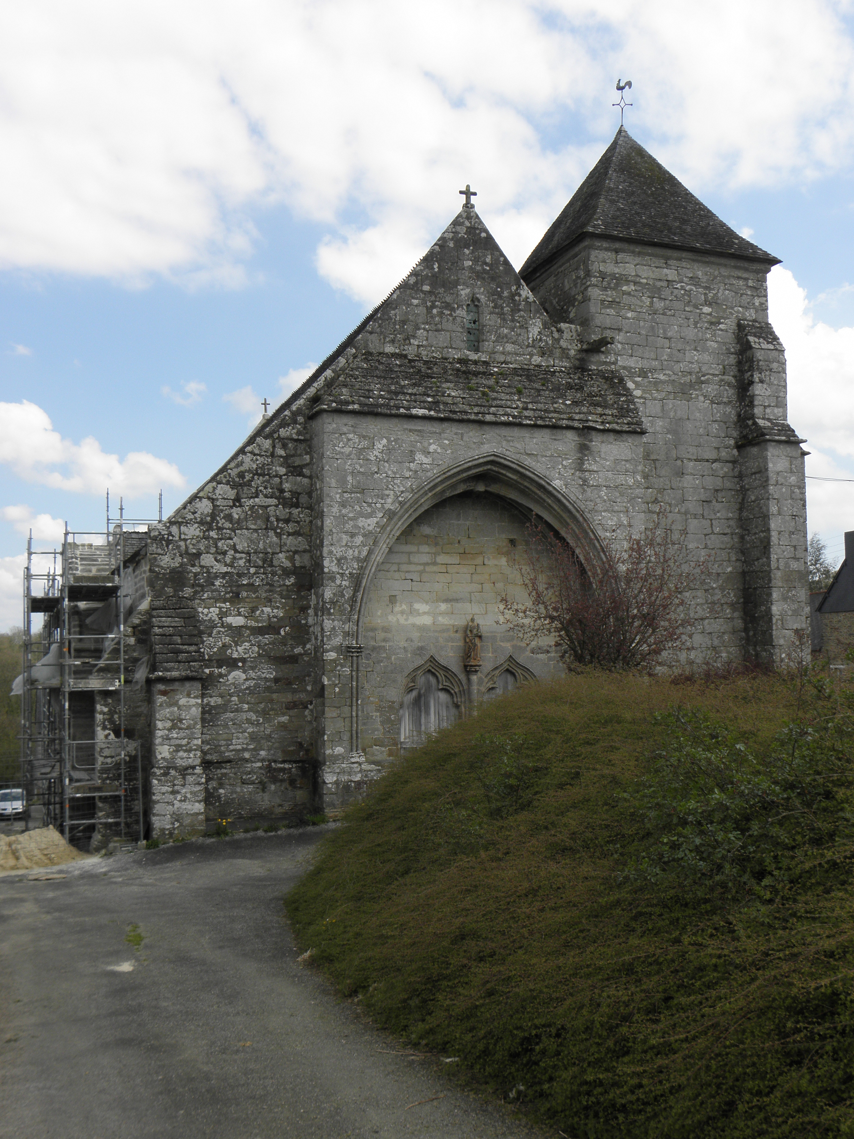 Chapelle Saint-Jacques en Merléac (22). Façade occidentale.